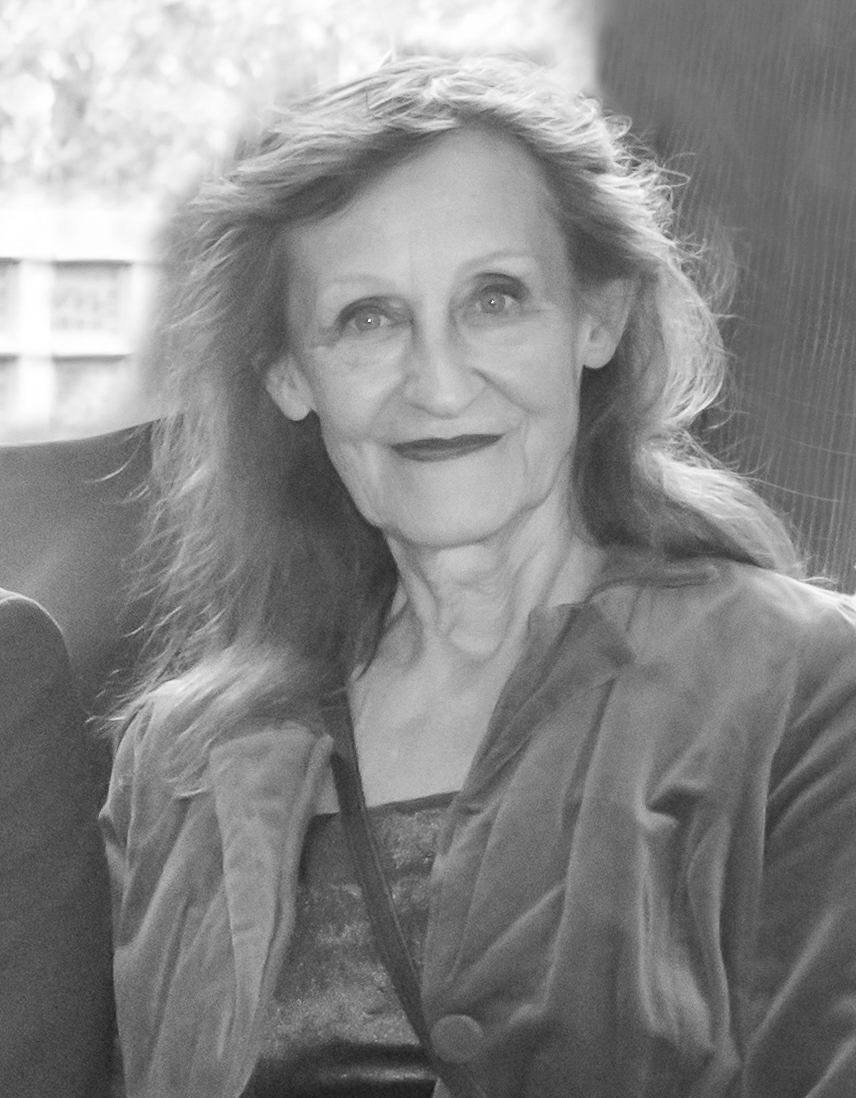 Empfang für Dr. Alfred Biolek zum 85. Geburtstag durch Kölns Oberbürgermeisterin im Muschelsaal des Historischen Rathauses von Köln